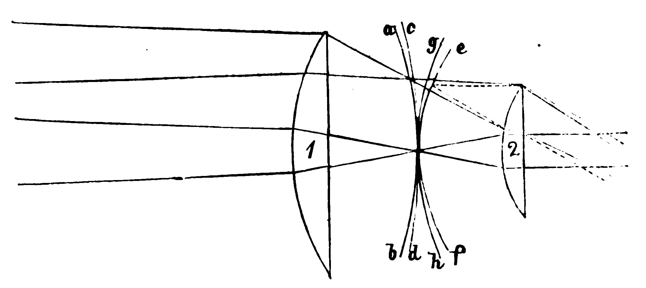 Einzige Abbildung in Kellners Schrift. Von links kommend die Lichtstrahlen vom Objektiv, die auf die erste Okularlinse treffen. Rechts ist die zweite Okularlinse dargestellt, dazwischen die Zwischenbildebene mit unterschiedlich gekrümmtem Zwischenbild.